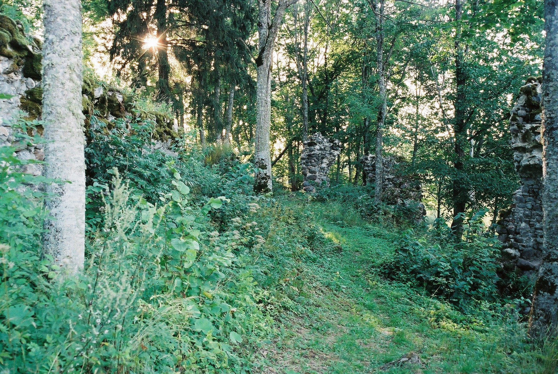 Tarwast Ordensburg Mauern